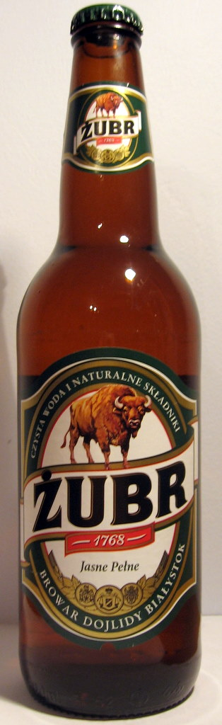 Butelka piwa Żubr produkowanego przez Kompanię Piwowarską SA.